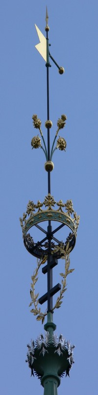 Flèche de la Tour de l'Horloge du Palais des Ducs de Lorraine à Nancy, présentant les emblèmes du Duché de Lorraine (Chardon, Alérions, Croix de Lorraine, Couronne Impériale)